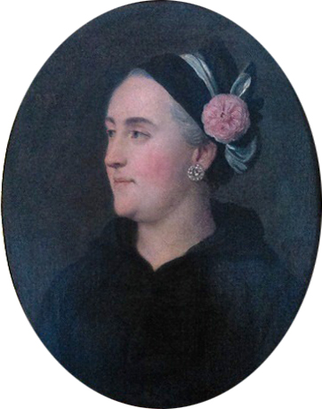 Беларуская (тарашкевіца): Партрэт Алены Радзівіл (Alena Radzivił) з Празьдзецкіх (Praździecki)